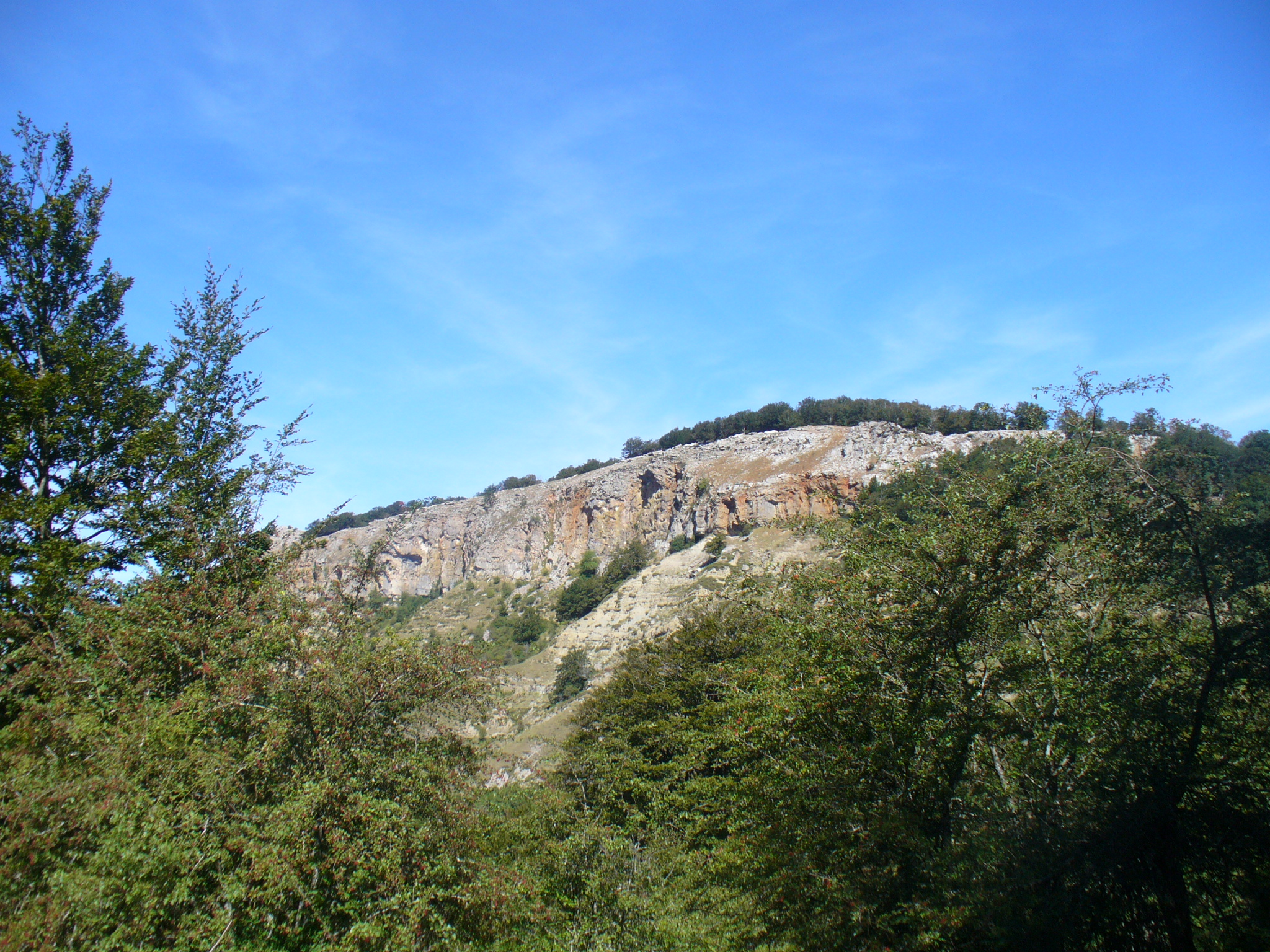 Ballo mendia Bikuñako mendatetik ikusita.